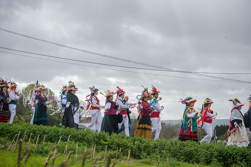 Máscaras ou bonitos, personaxes do Entroido de Samede